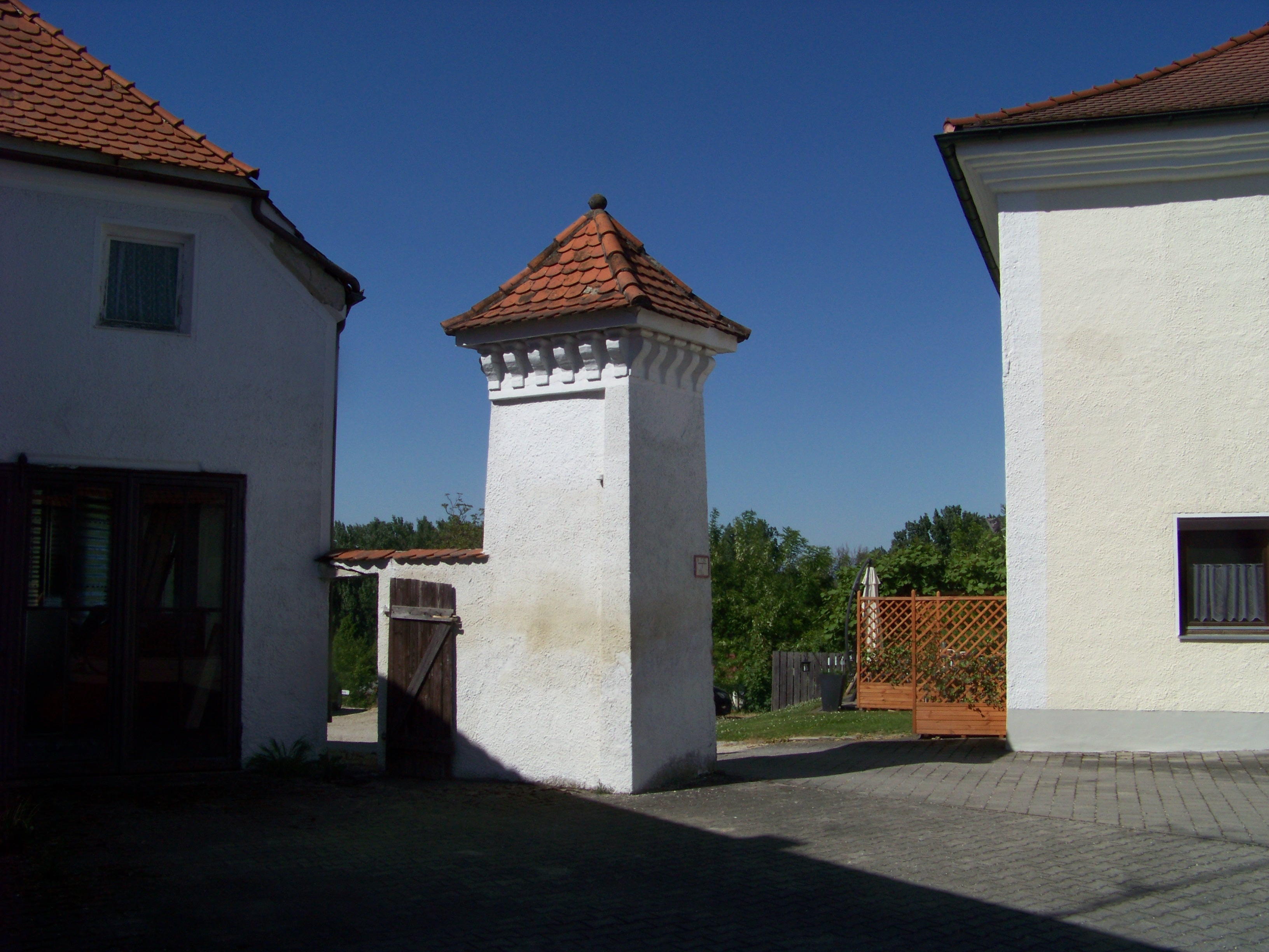 Deggendorf, Oberpöring, Landauer Straße 24. Torpfeiler der ehemaligen Toranlage des abgegangenen Schlosses. 16. /17. Jahrhundert.